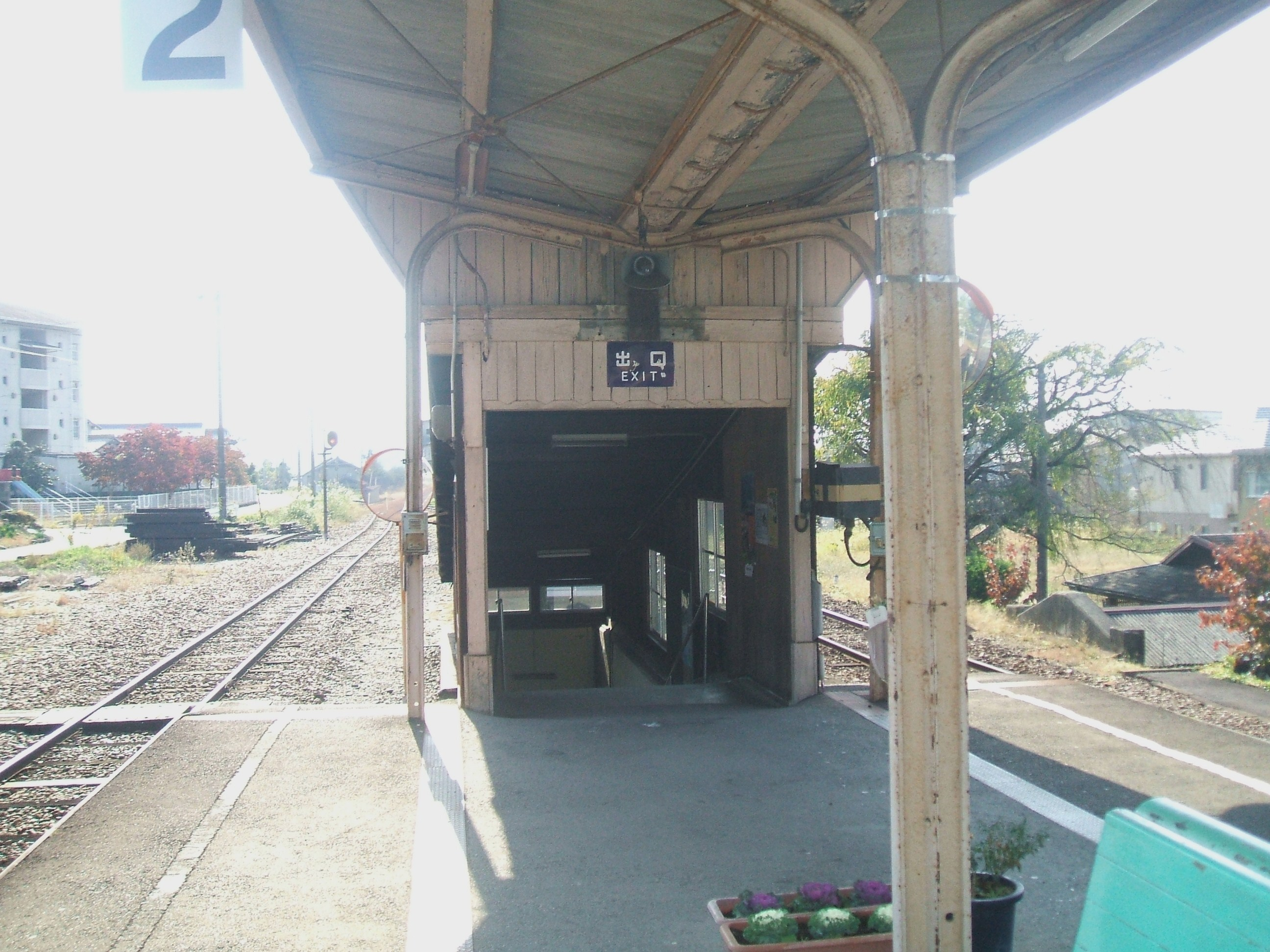 ホームからの出入口